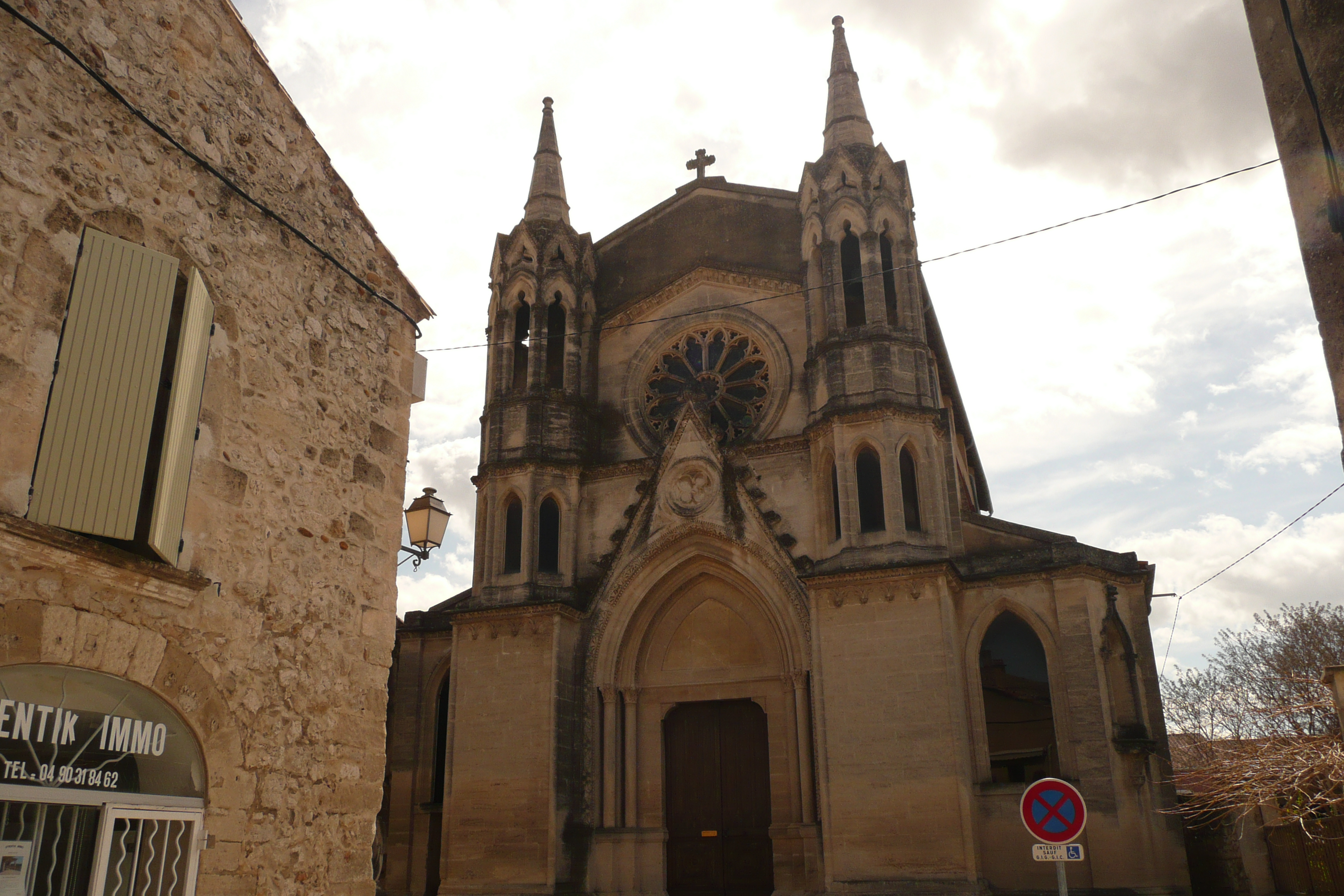 Eglise à Rochefort-du-Gard.